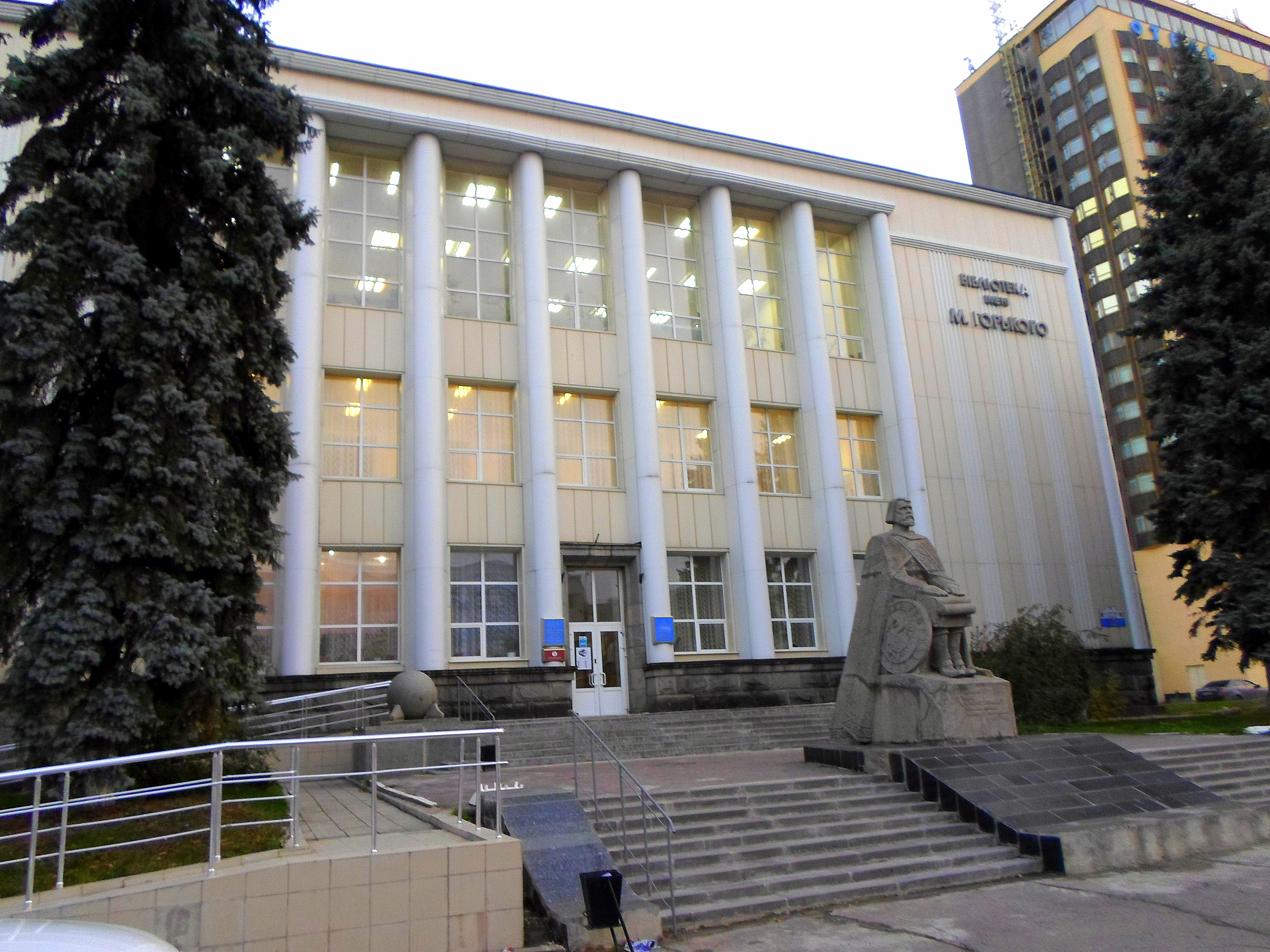 Lugansk regional universal scientific library. Областная научная библиотека Луганска имени Горького. October, 2013